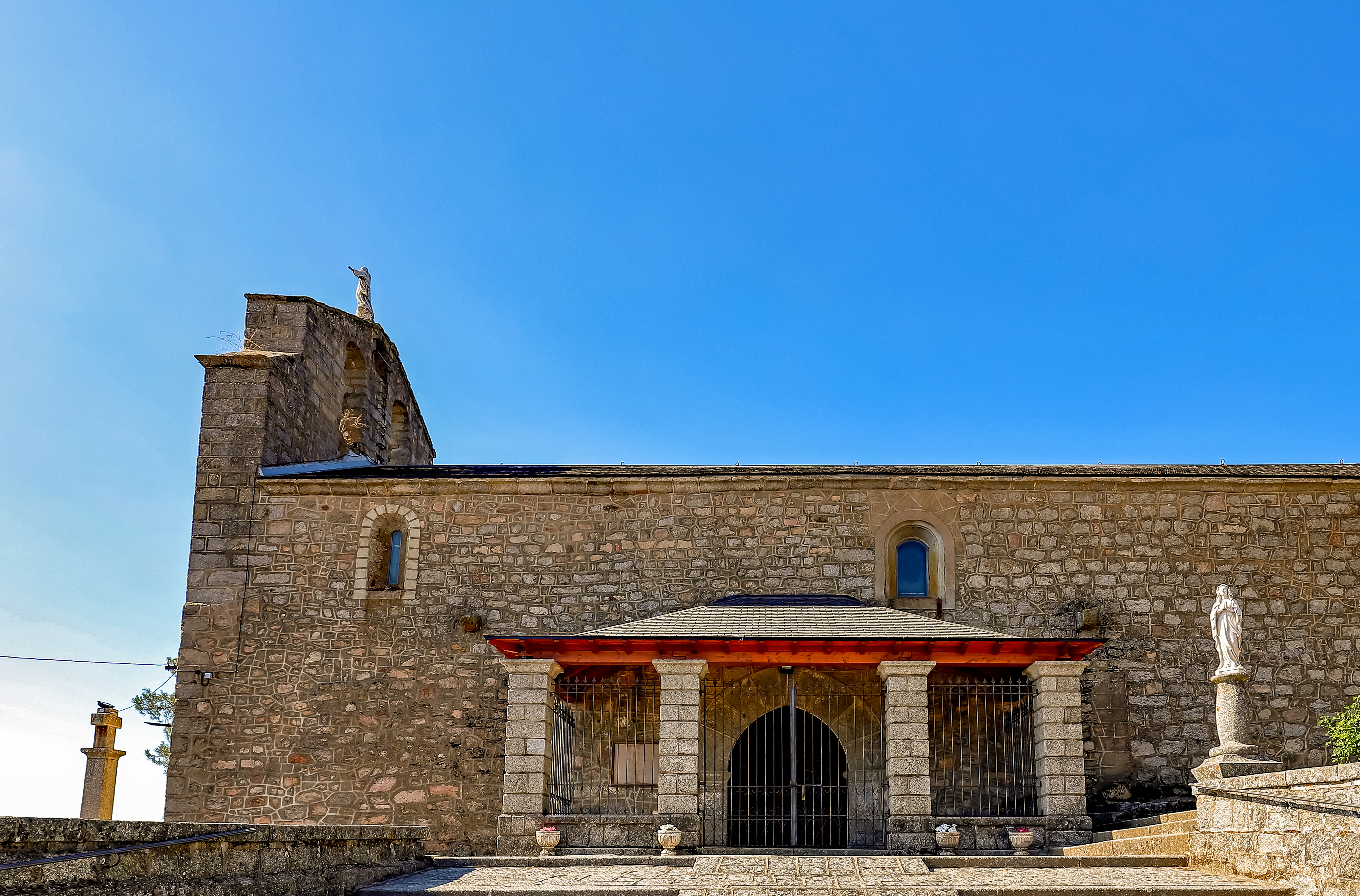 Navalperal de Pinares es un municipio de la comarca Tierra de Pinares, en la provincia de Ávila.